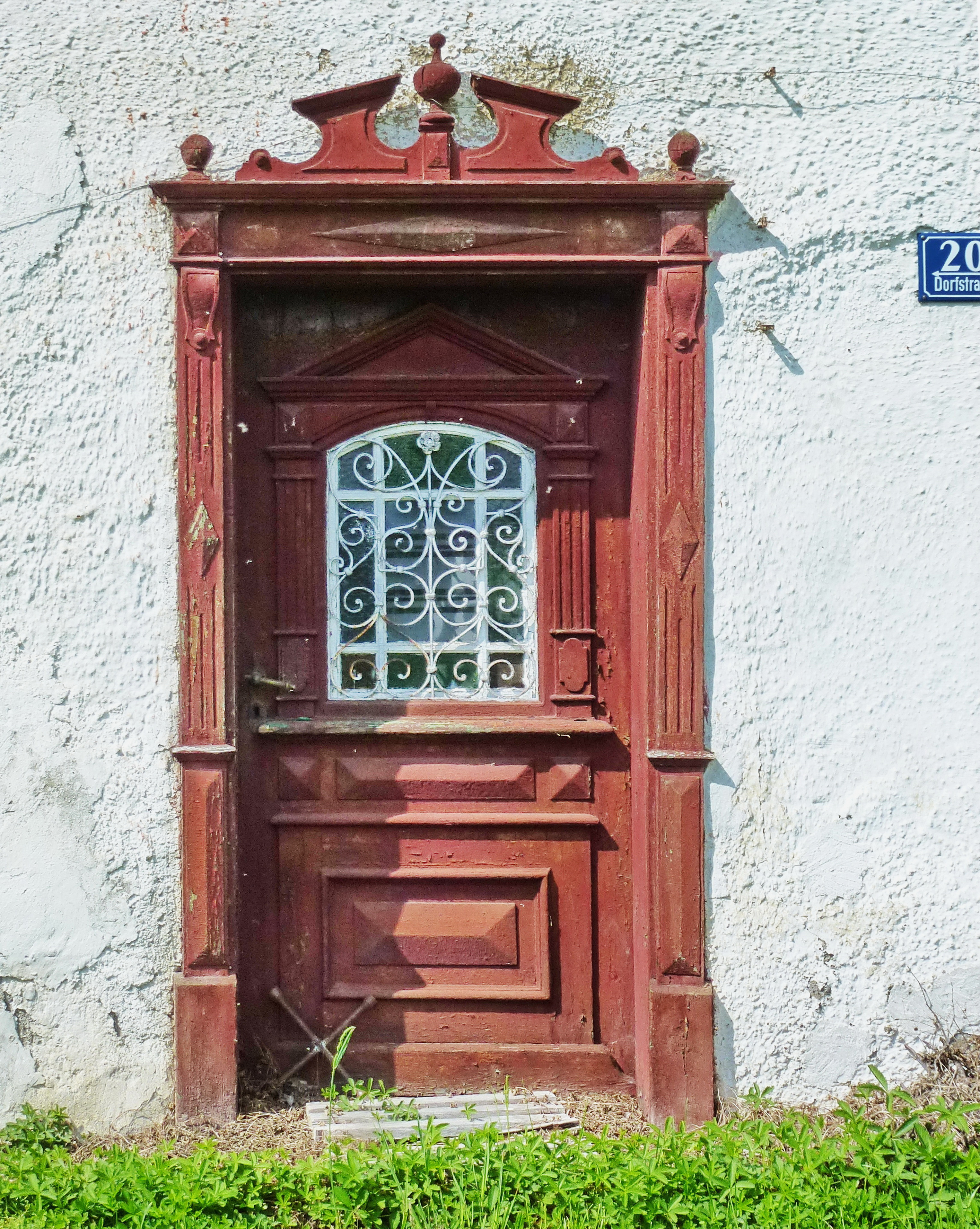 Kottgeisering, Dorfstr. 20: Ehemaliges Bauernhaus. Detail: Holztür